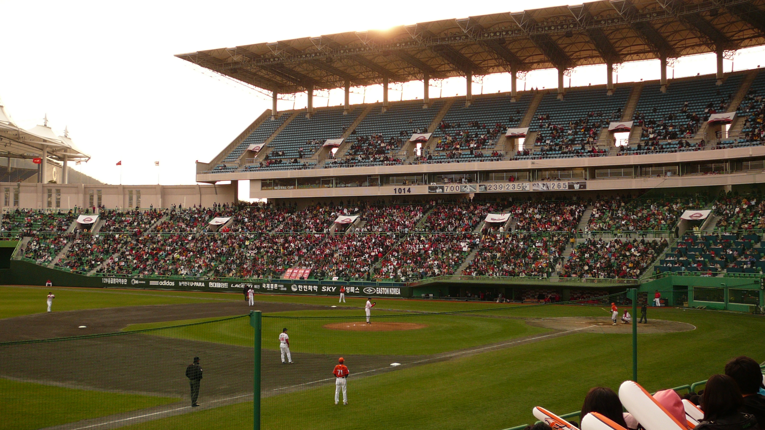 문학 야구장 전경: SK 대 한화 경기Munhak Baseball Stadium: SK vs. Hanhwa